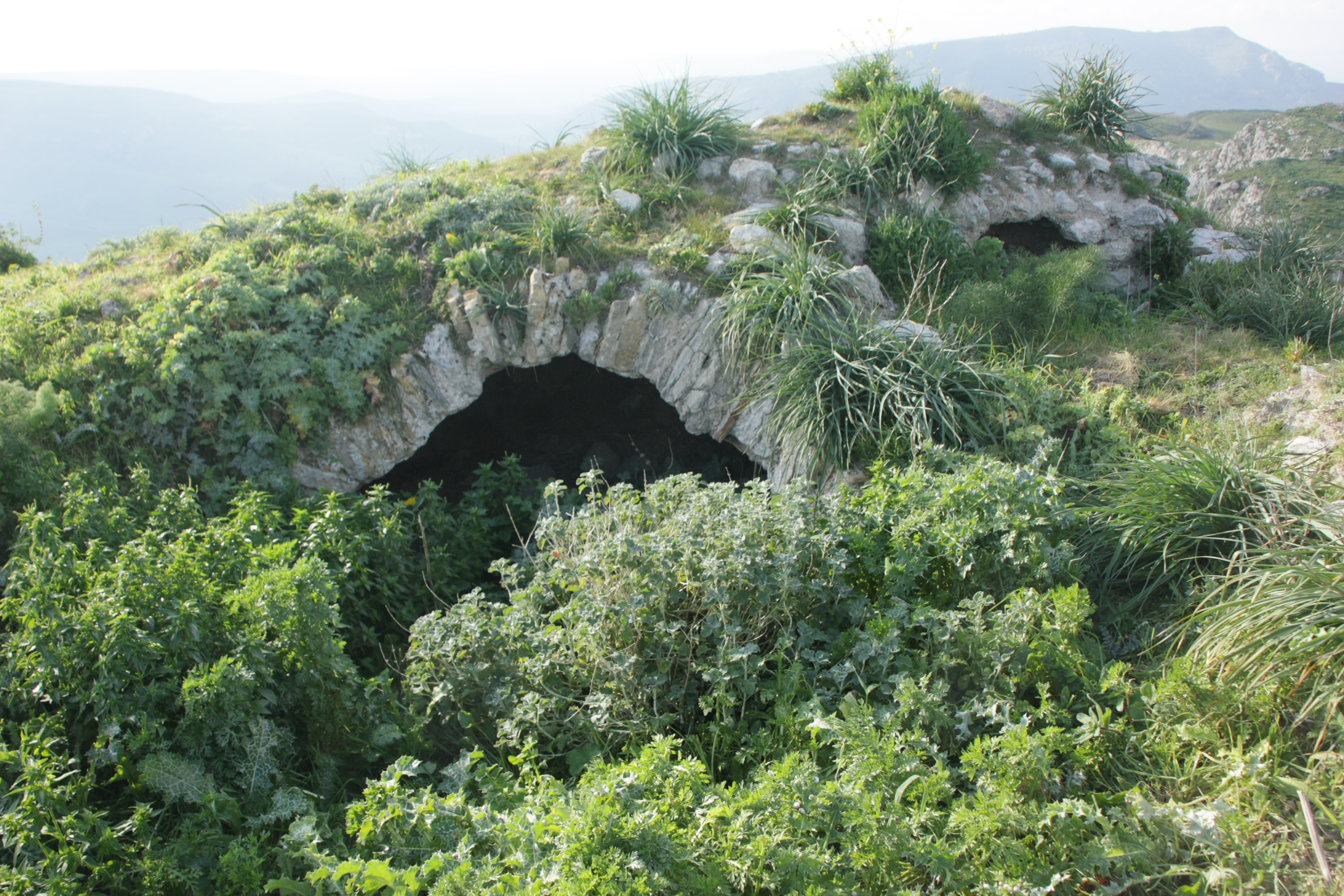 Torre sud Entella